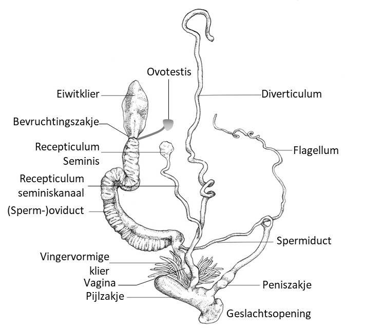 Cornu aspersum reproductive organ (Dutch)